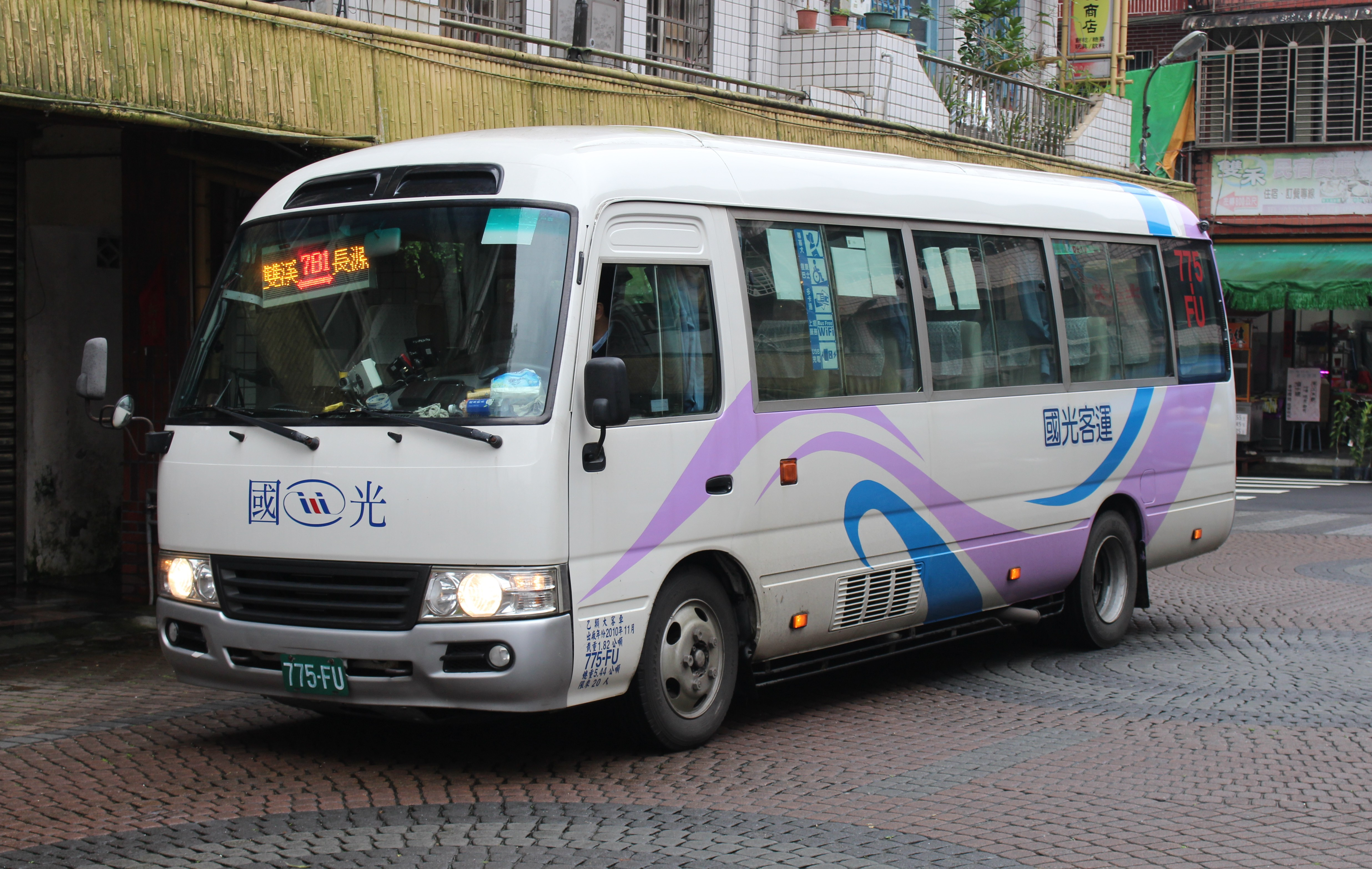 中文（台灣）: 國光客運 2013 TOYOTA COASTER XZB50L 775-FU 新北市區公車781線